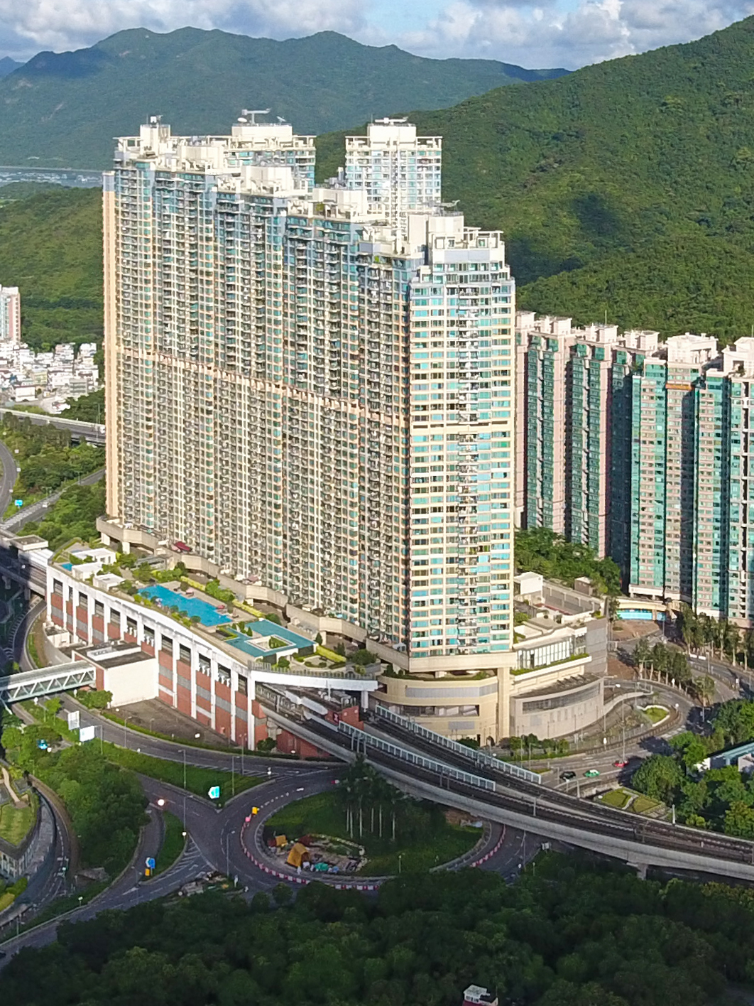 Lake Silver